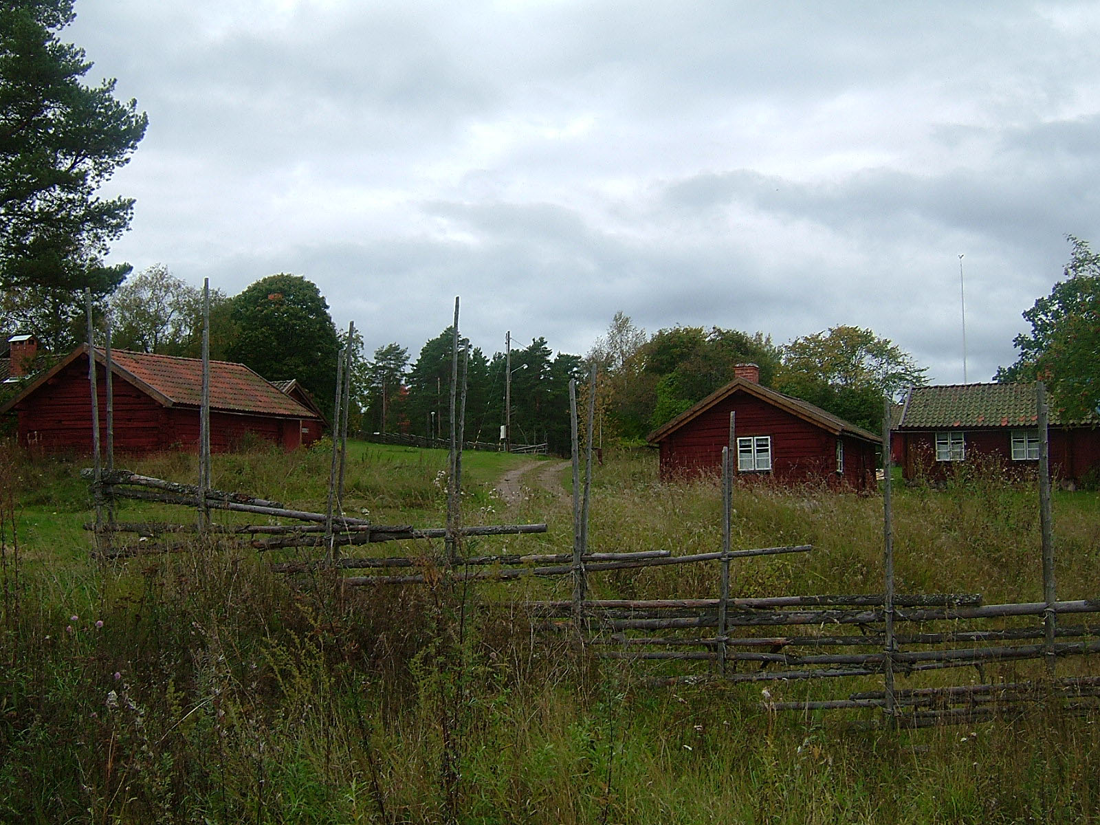 Koversta gammelby i Österfärnebo en dag på hösten